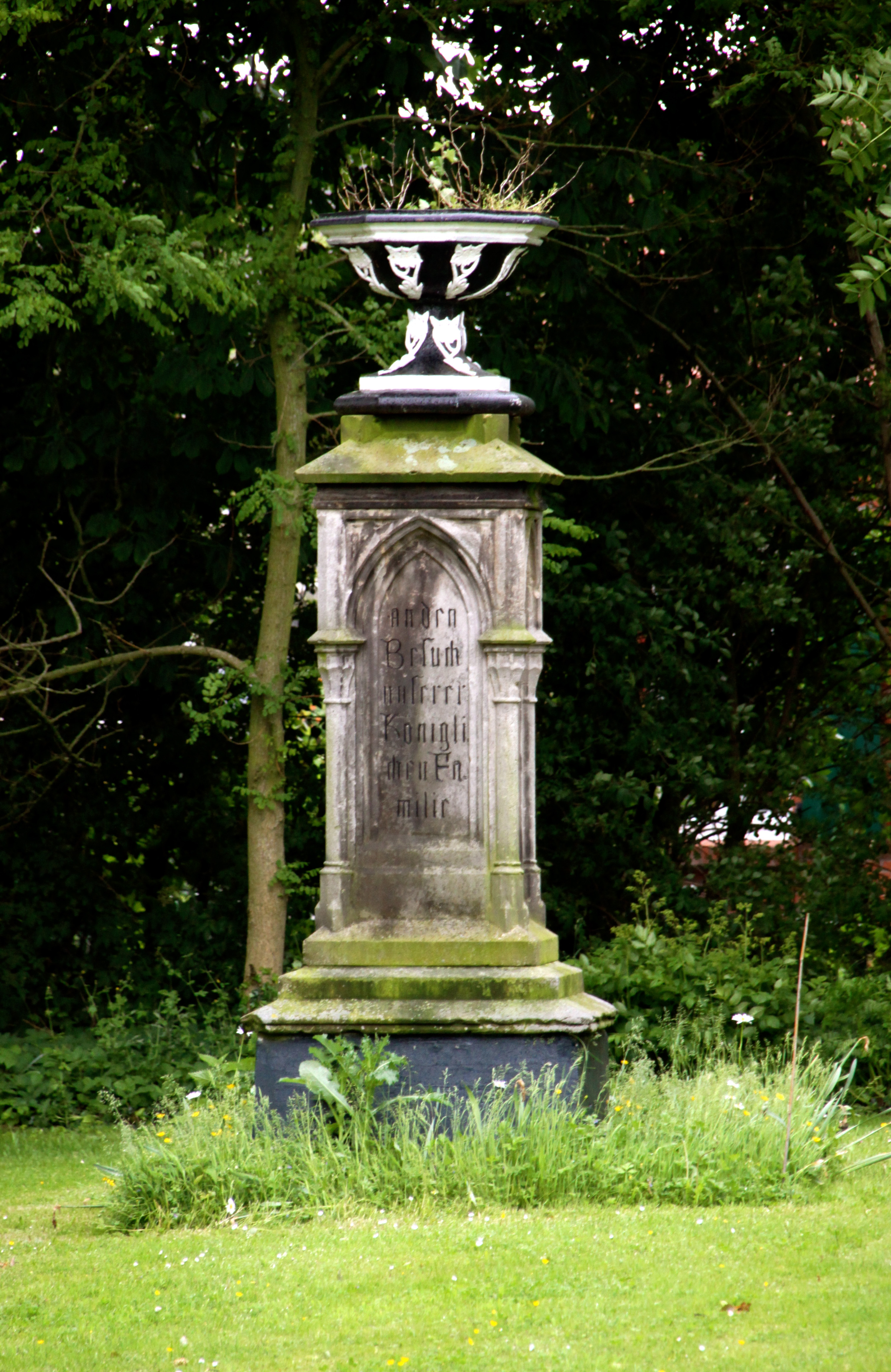 Das Denkmal zur Erinnerung an den Besuch Georg V. (Hannover) im Fresenhaus in Loppersum